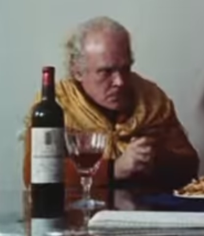 Patrick Magee in "A Clockwork Orange"